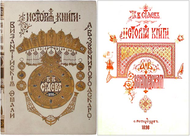 Стасов В.В. «История книги „Византийские эмали“ А. В. Звенигородского», 1898 год (переплет и титульный лист русского издания)